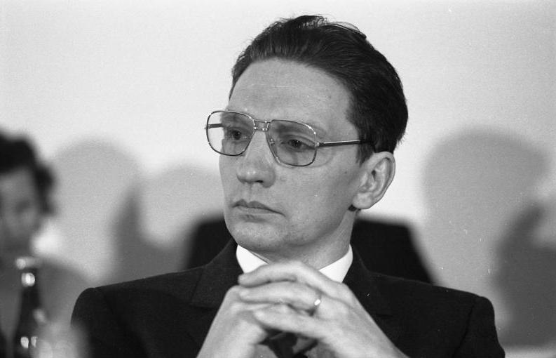 03.02.1983 Friedenskongreß der CDU im Konrad-Adenauer-Haus, Bonn.